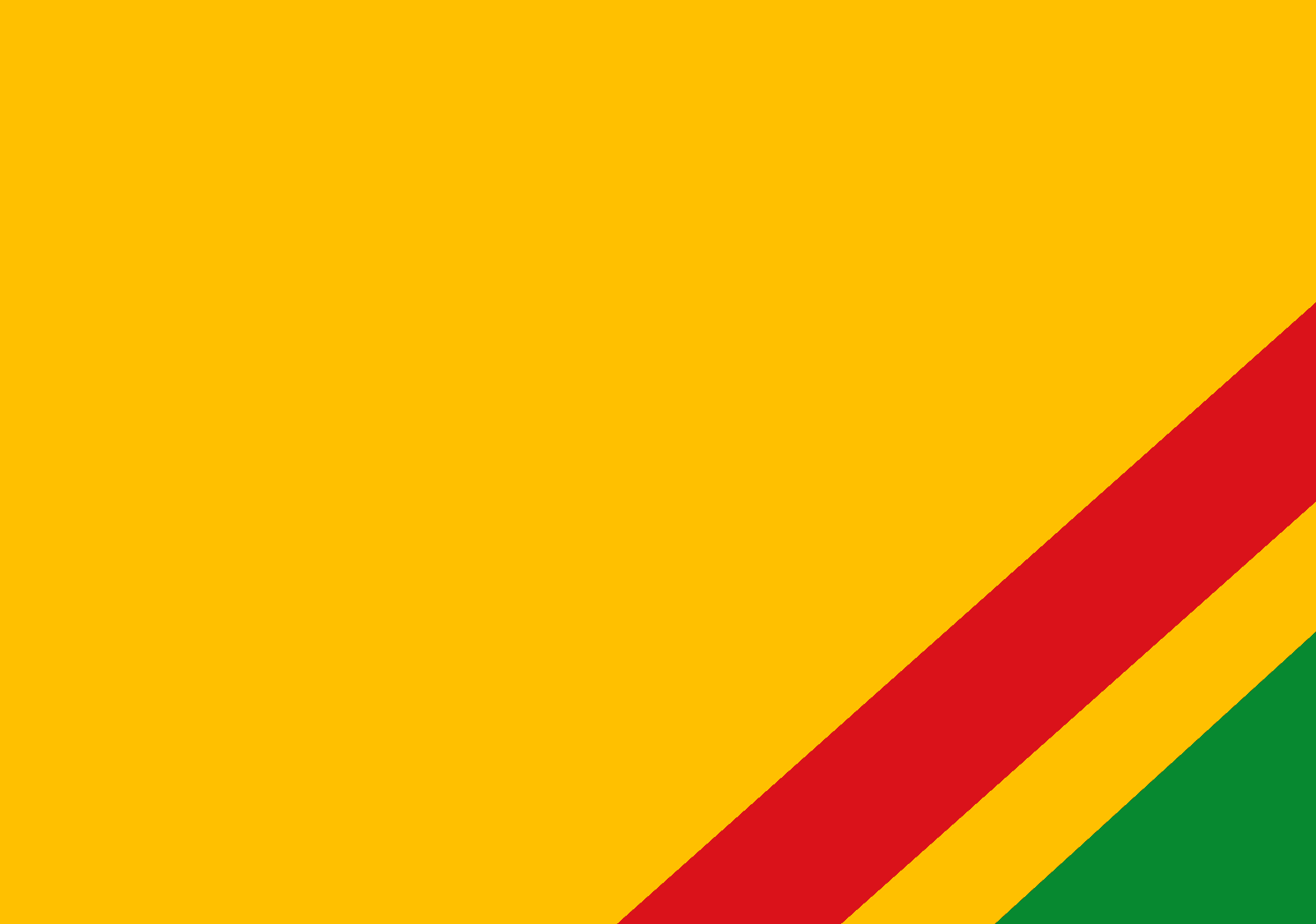 Bandera de la provincia de Cotabambas y del distrito de Tambobamba - Apurímac